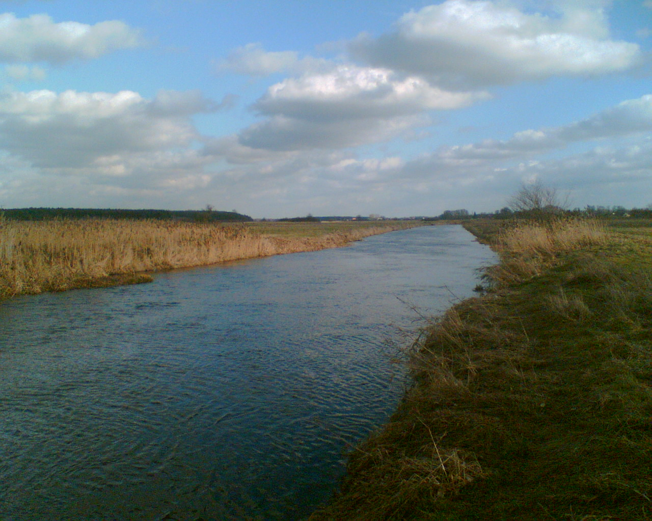 Rzeka Krzna